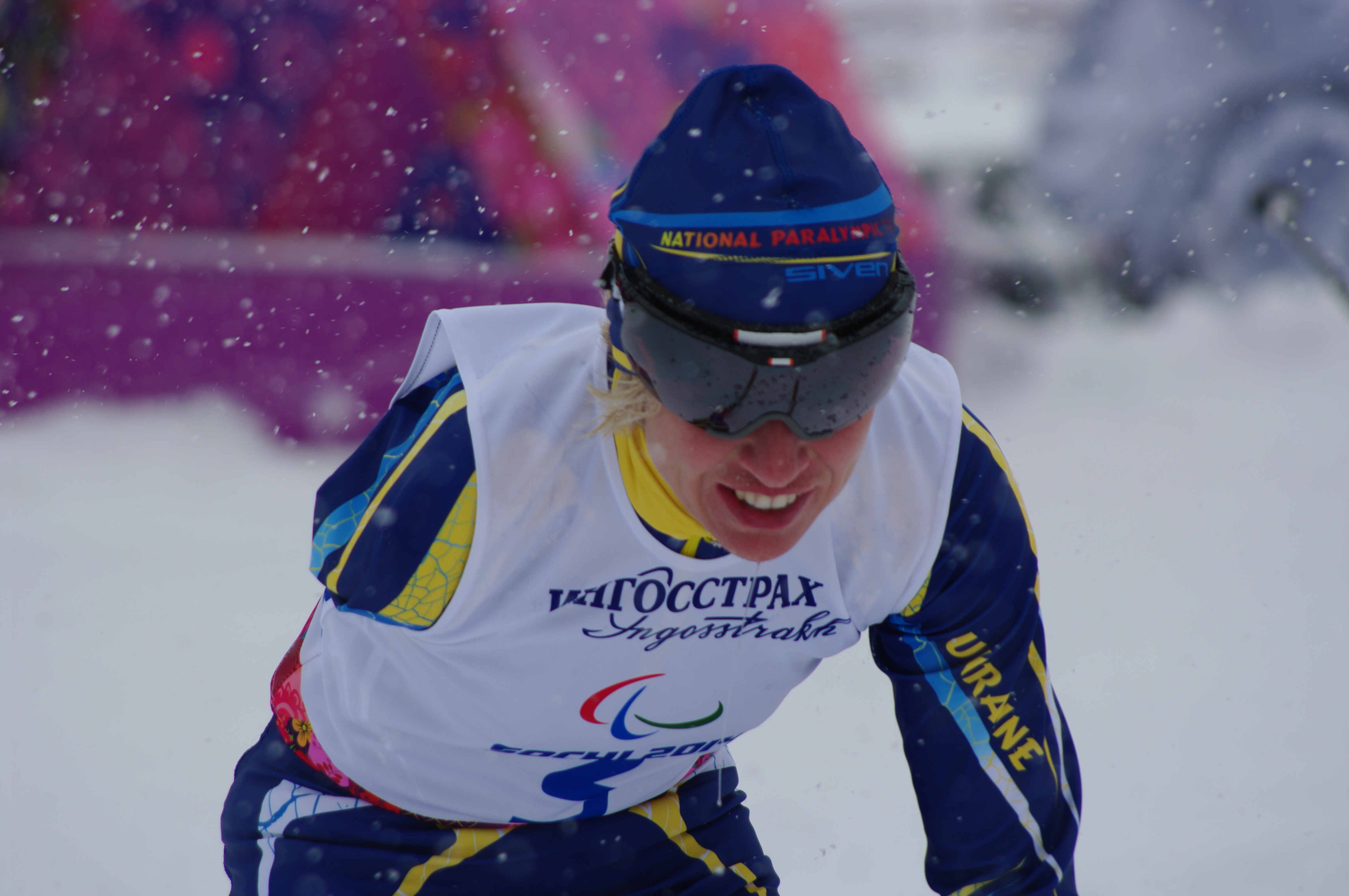 Ukraine at the Winter Paralympics